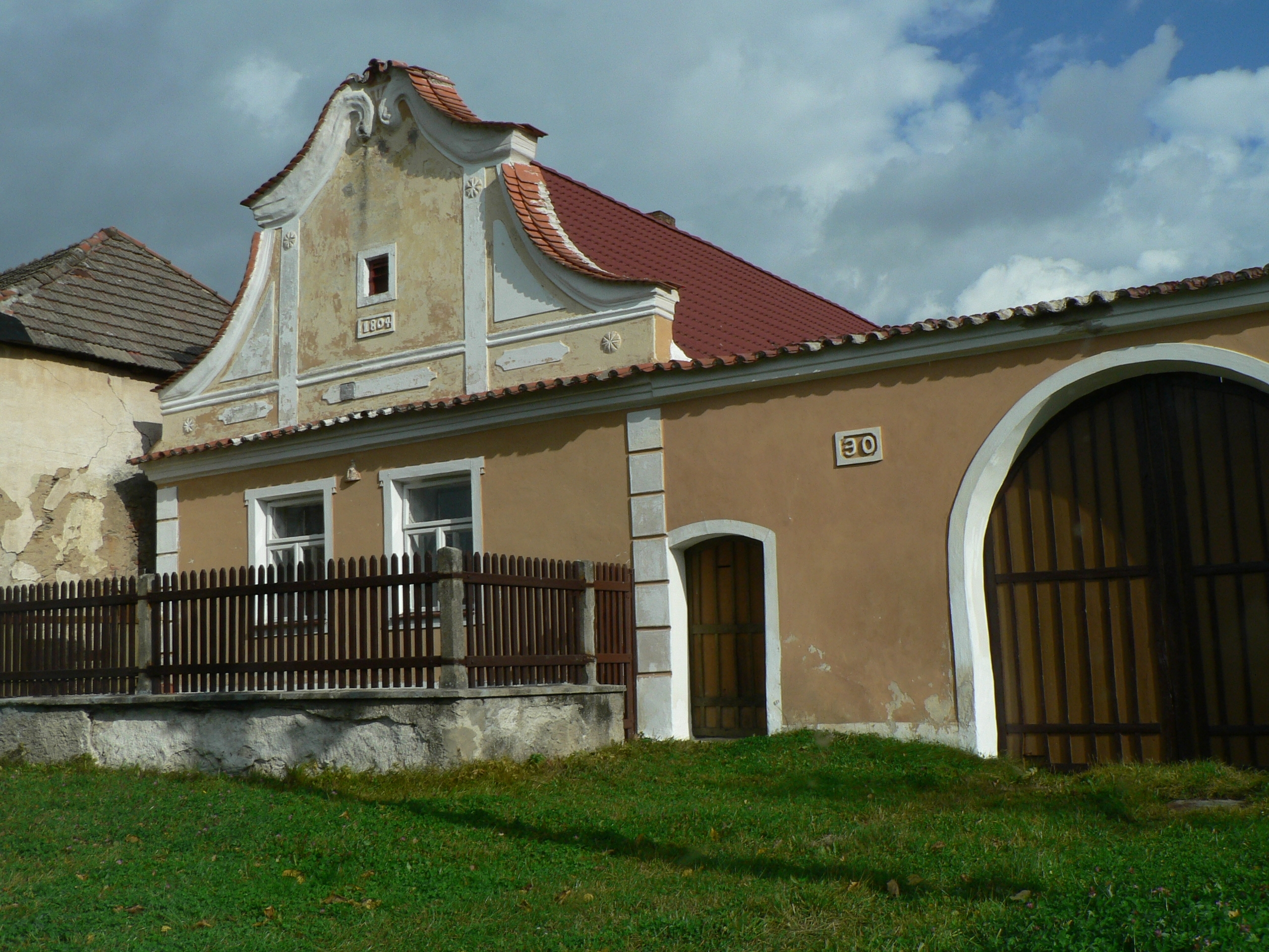 Venkovská usedlost čp. 30 v Hodonicích (okr. Tábor).